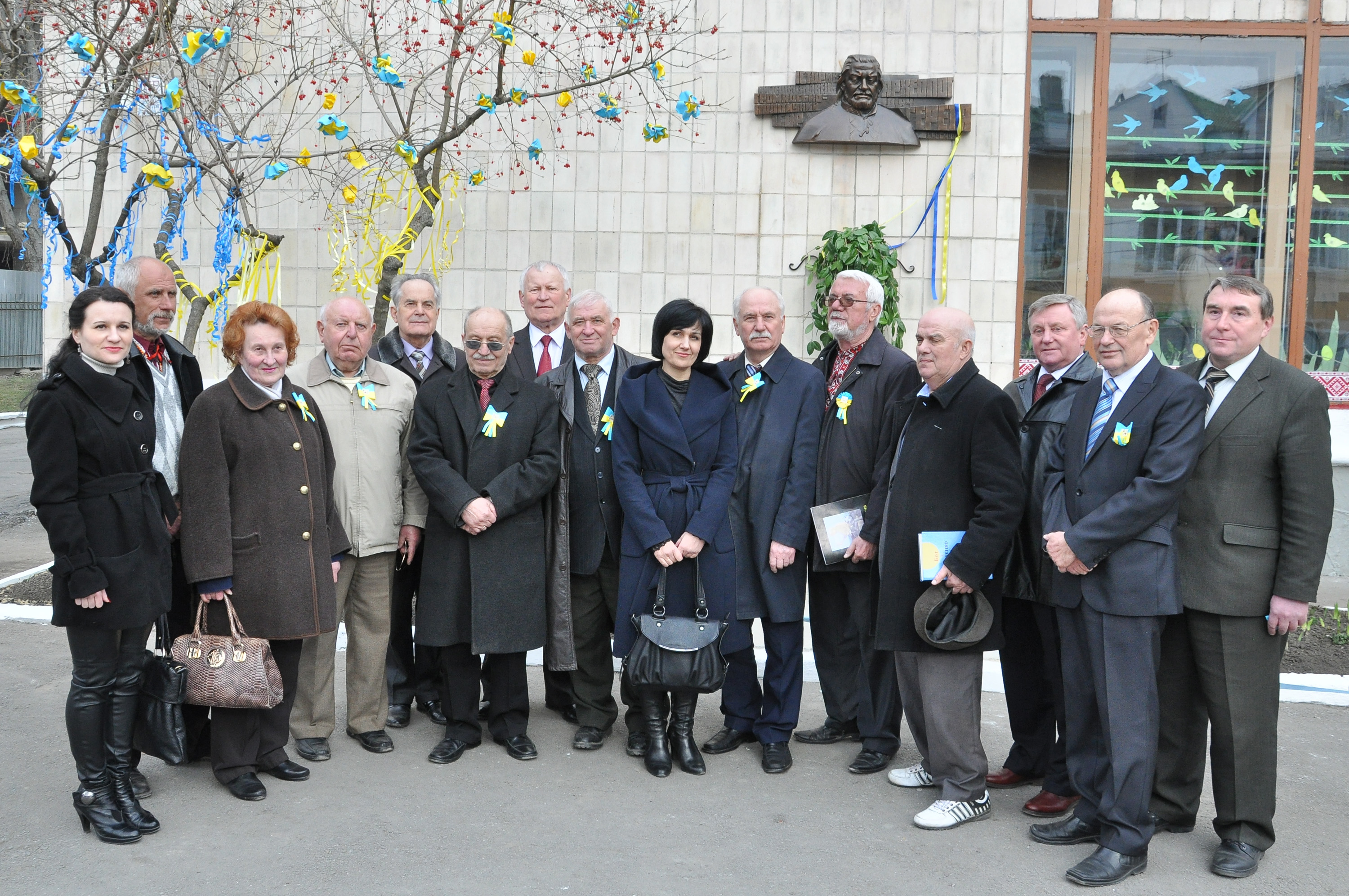 Тернопільські діячі культури і мистецтва біля нововідкритої пам'ятної дошки Ігореві Ґереті на фасаді Тернопільської обласної комунальної експериментальної комплексної школи мистецтв імені Ігоря Ґерети: невідома, Павло Костів, Дарія Чубата, Іван Ваврик, Михайло Андрейчин, Ярослав Омелян, Остап Гайдукевич, Володимир Колінець, невідома, Ігор Дуда, Богдан Хаварівський, невідомий, невідомий, Олег Герман, невідомий.